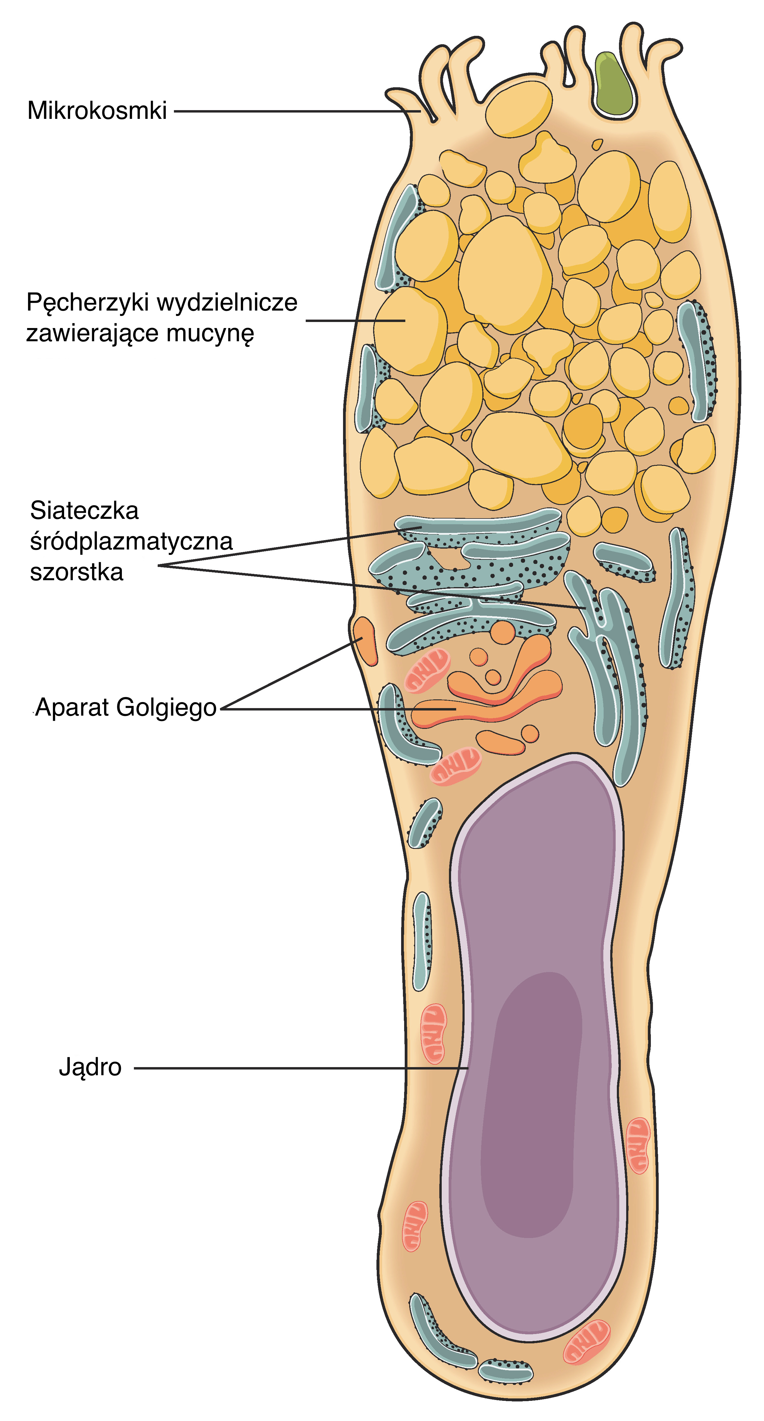 Komórka kubkowa - polskie opisy ilustracji pochodzącej ze strony Anatomy & Physiology, Connexions. [1]